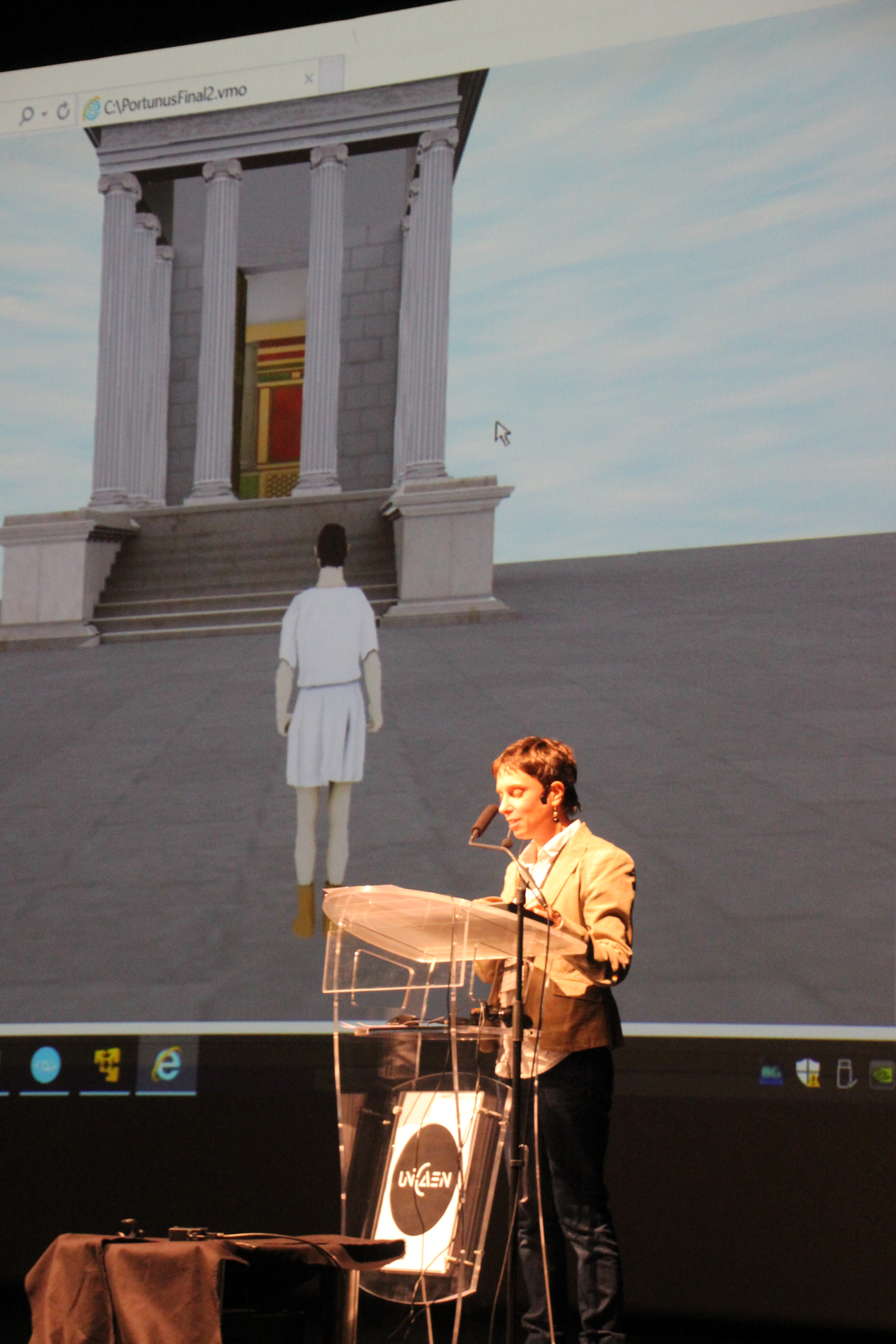 10 ans de Nocturnes du Plan de Rome 2016 - Sophie Madeleine et Marcus